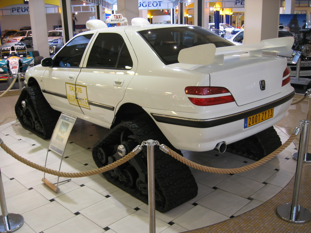 Taxi 406 Marseille du film Taxi 3 de Luc Besson au musée Peugeot de Montbeliard